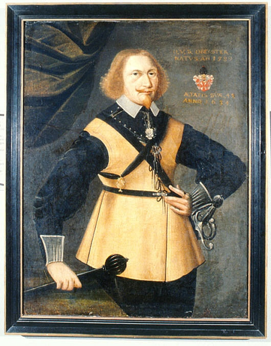 Porträt des Otto von Sack (1598-1658), Obrist der schwedischen Armee, Öl auf Leinwand, aus dem Jahr 1634. Das Gemälde befindet sich in der Rüstkammer des königlichen Schlosses in Stockholm (Livrustkammaren).